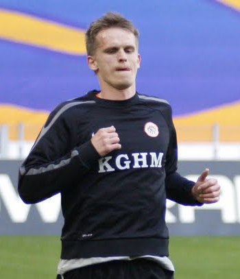 Lech - Zagł 022.jpg